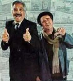 Federico Luppi y Julio de Grazia. Película "Plata dulce" (1982).